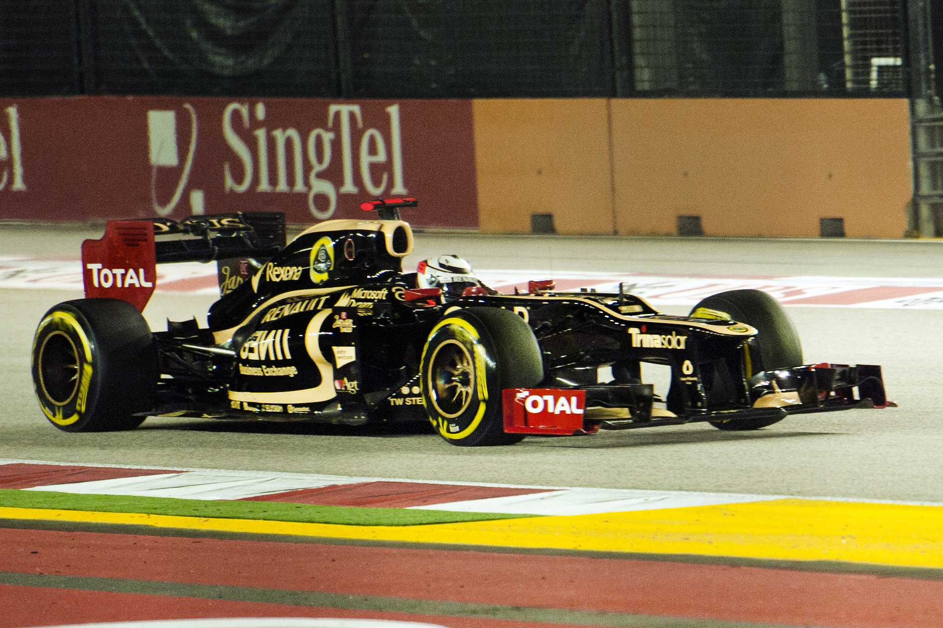 Raikkonen